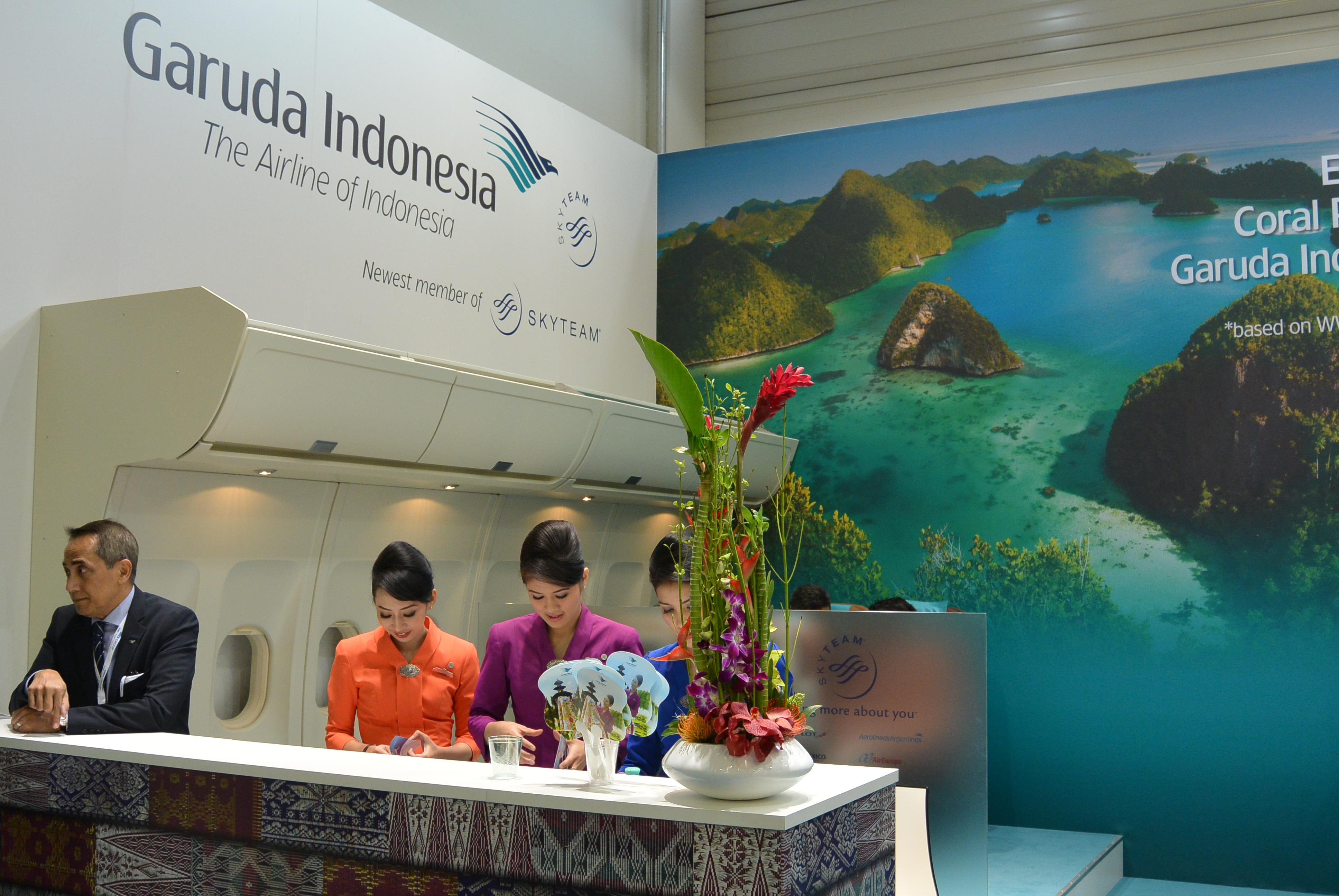 Stoisko linii lotniczych Garuda Indonesia podczas ITB Berlin 2014.